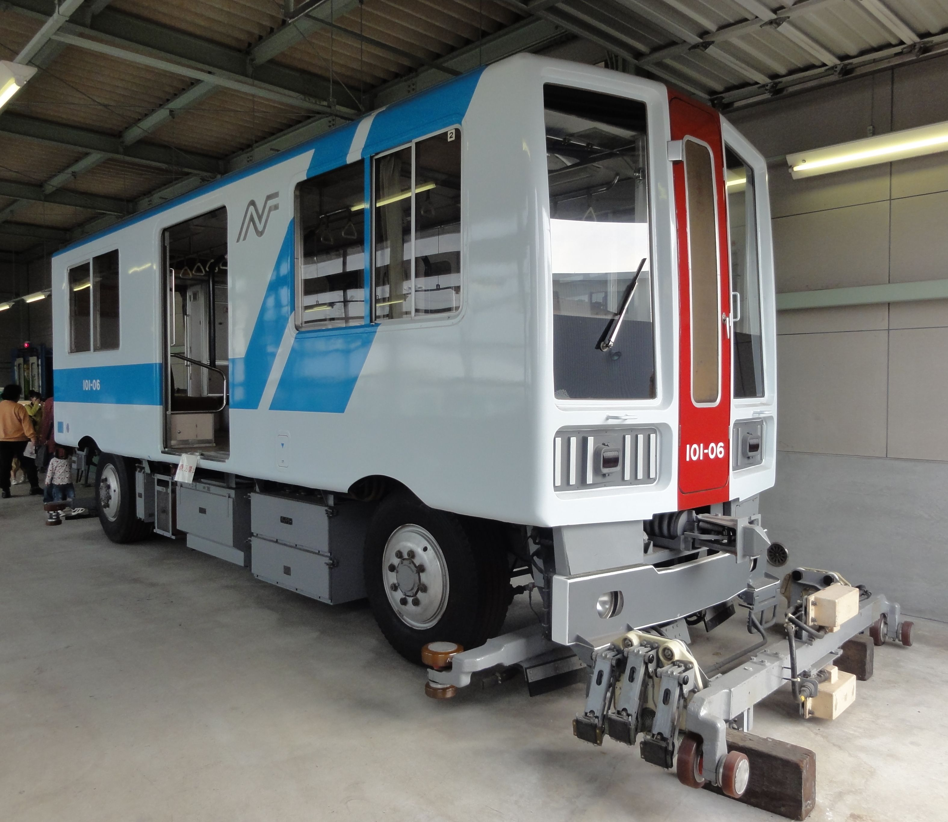 大阪市交通局100系電車 (新交通)